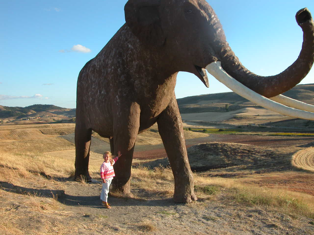 Elephas antiquus, fiber model, Ambrona, Soria, España